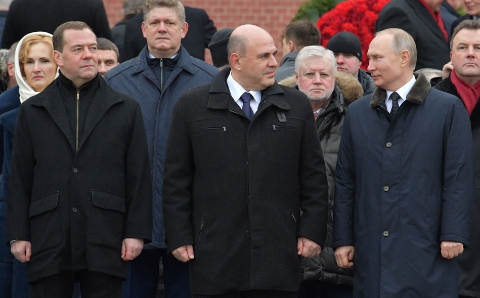 Д.А. Медведев, М.В. Мишустин и В.В. Путин, 23 февраля 2020 года